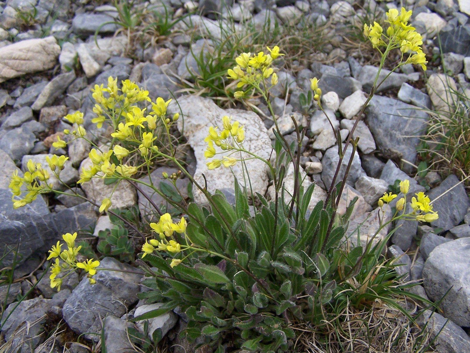 Biscutella laevigata (pl. pleszczotka górska), habitat: Tatra Mountains, Kobylarzowy Żleb)